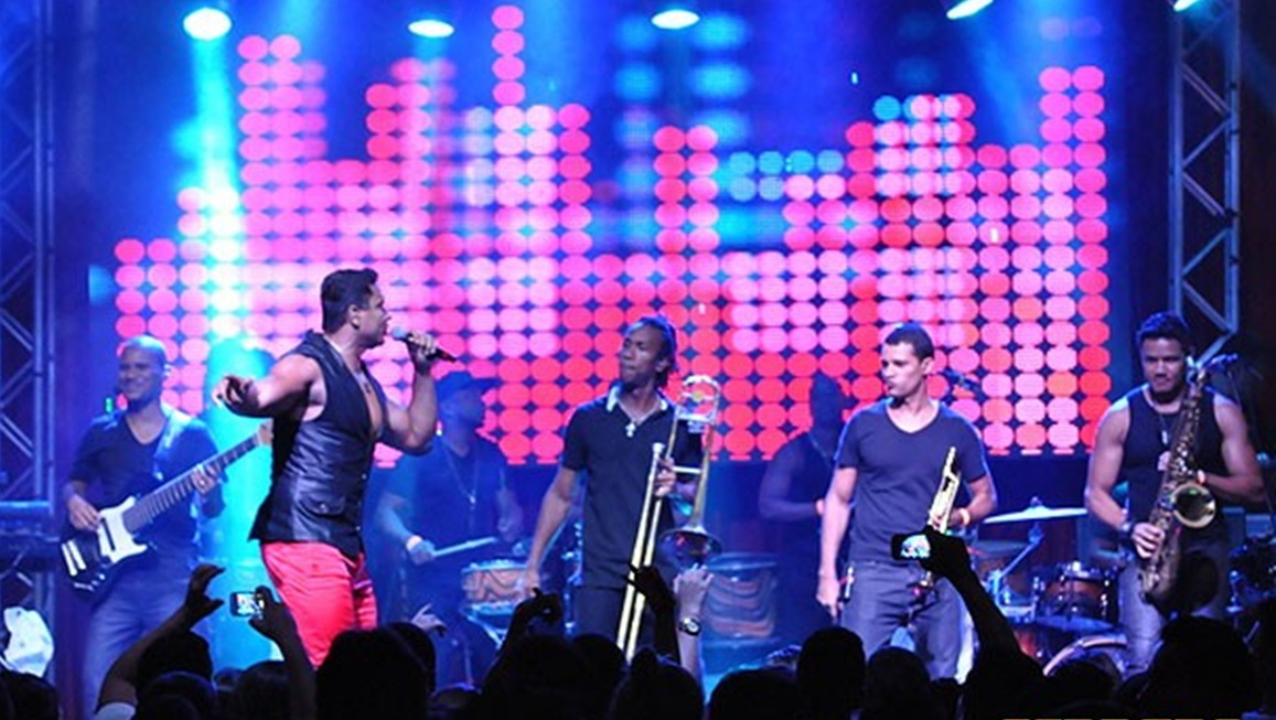 Harmonia do Samba, grupo musical brasileiro (pagode), durante apresentação em Brasília.